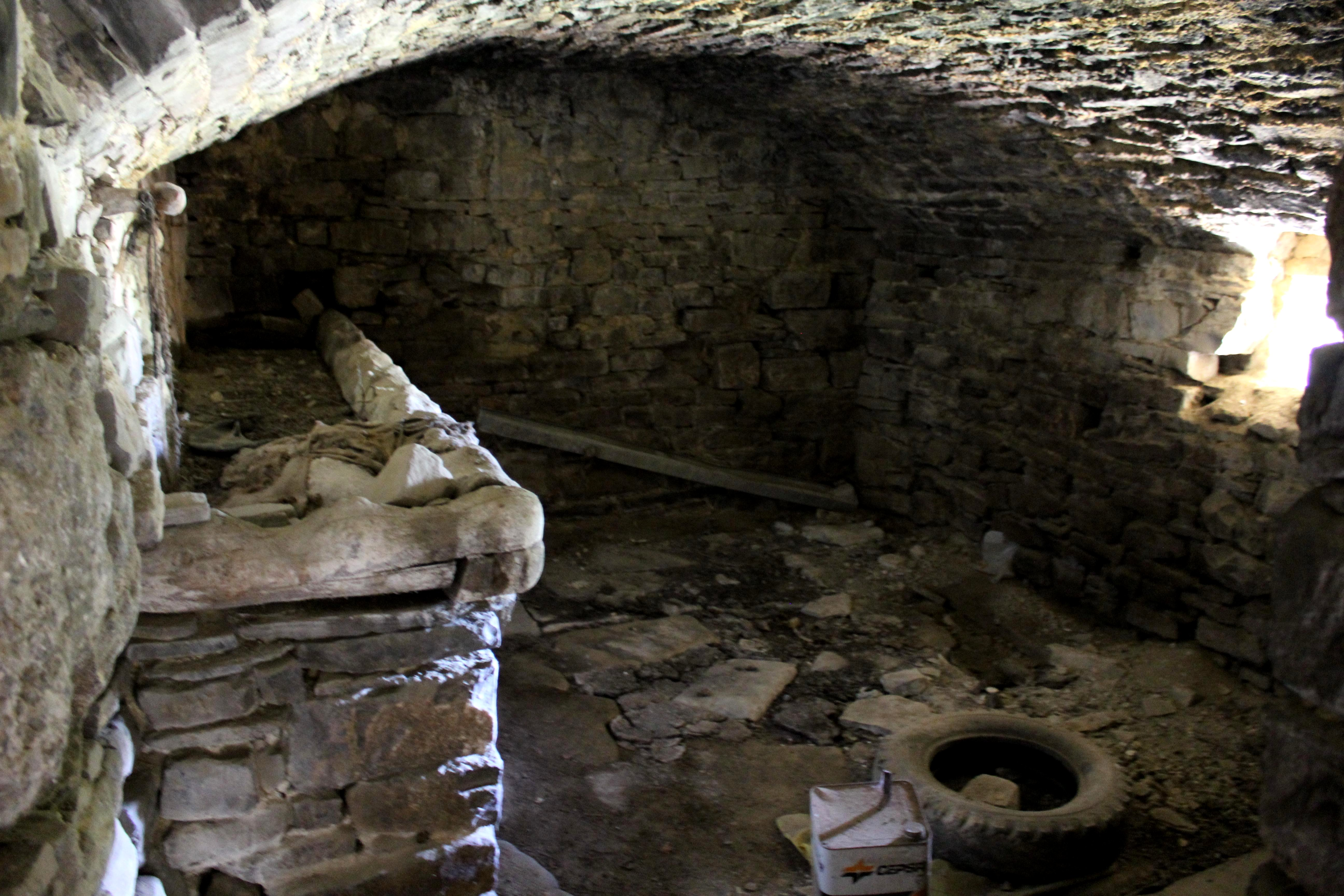 Aragonés: Una Quadra en L'Atiart, A Fueva.